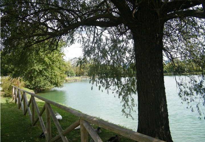 Veduta del Parco Pertini di Agliana, parco con un lago che si trova al centro della cittadina. In precedenza il lago era una cava di argilla.